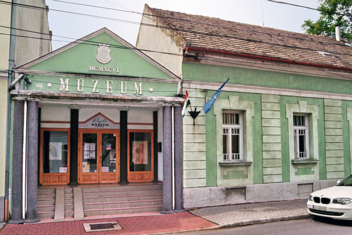 Das archäologische György-Klapka-Múzeum in Komárom, Ungarn. Komárom, Kelemen László utca 22